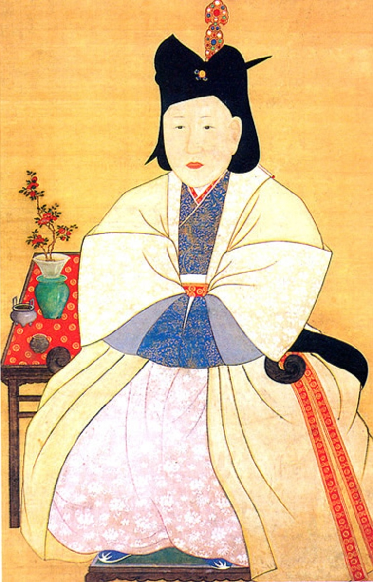 문효공과정경부인영정(文孝公과貞敬夫人影幀), 전라북도 유형문화재 제81호 中文（香港）: 領議政河演夫婦影幀